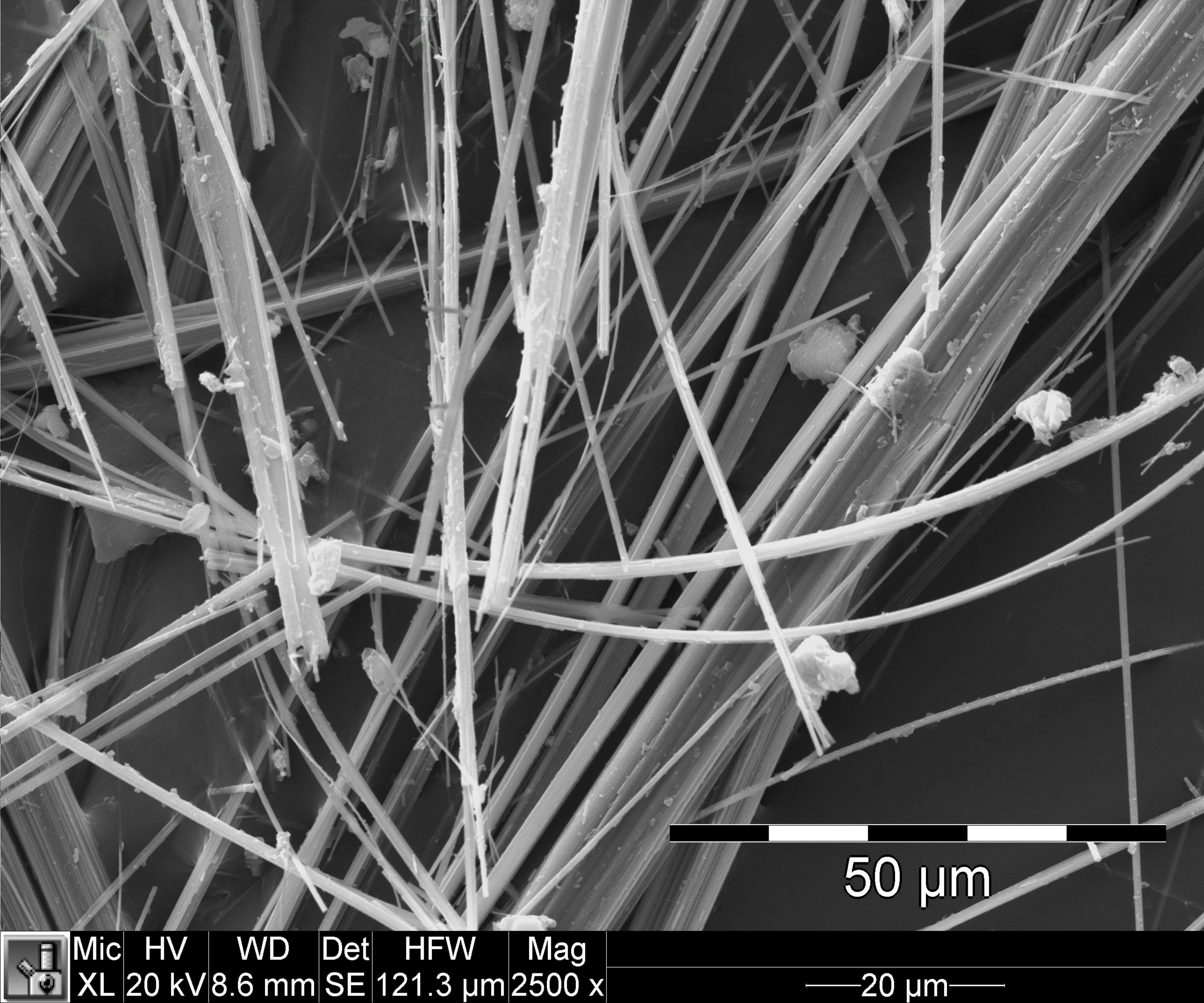 Rasterelektronenmikroskopische Aufnahme von Asbestfasern (Amosit)